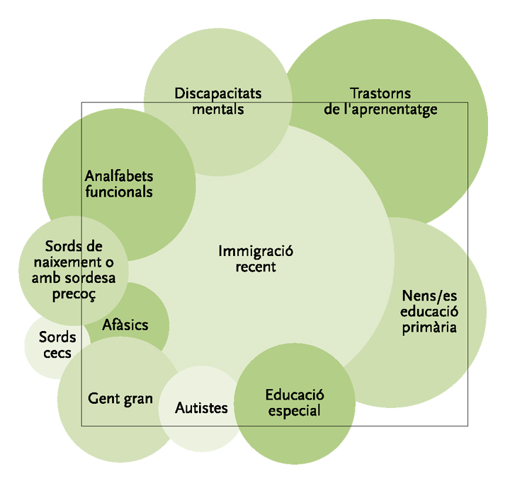 Destinataris LF